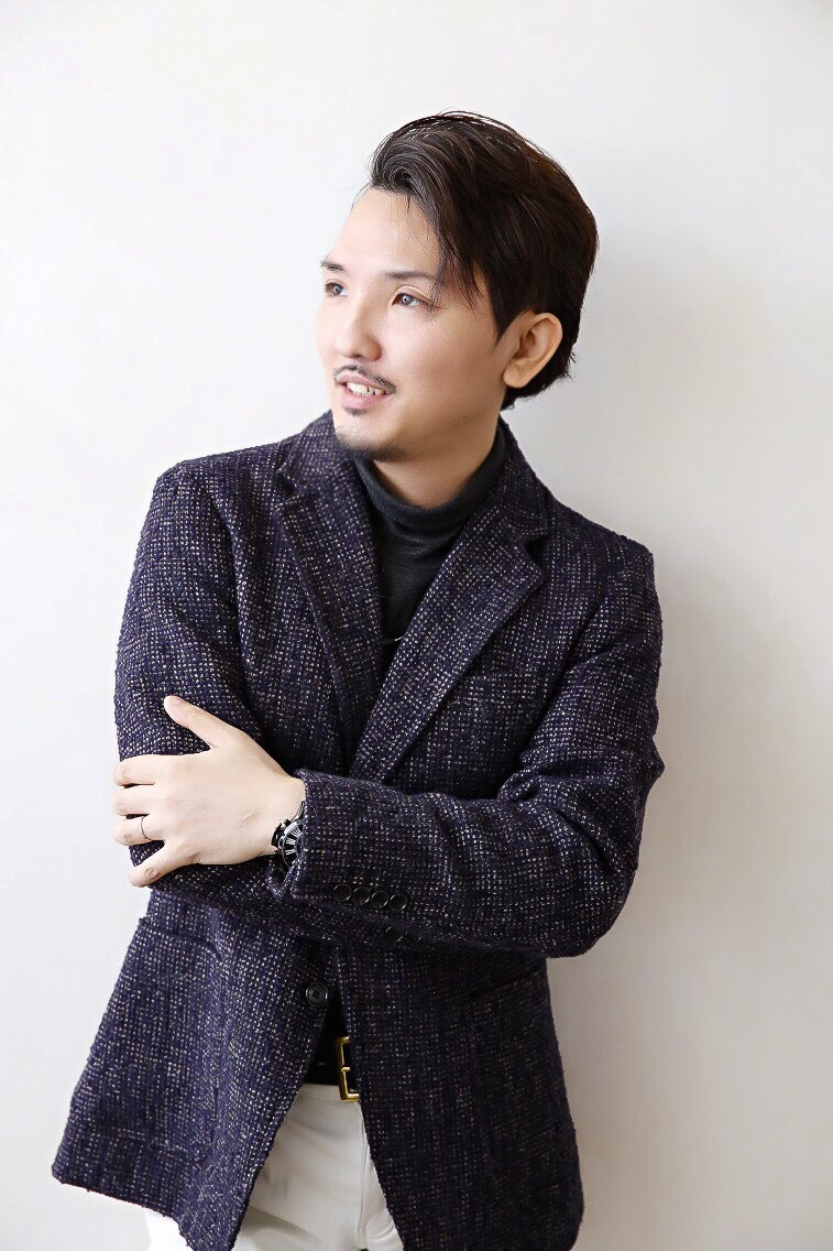 KAJIIカメラマンによるアーティスト写真。